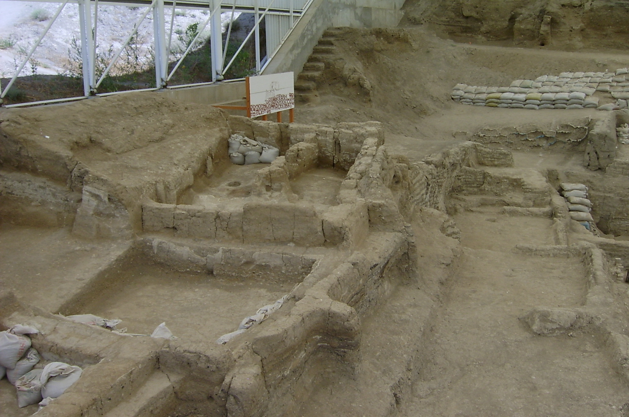 Çatal Hüyük excavations